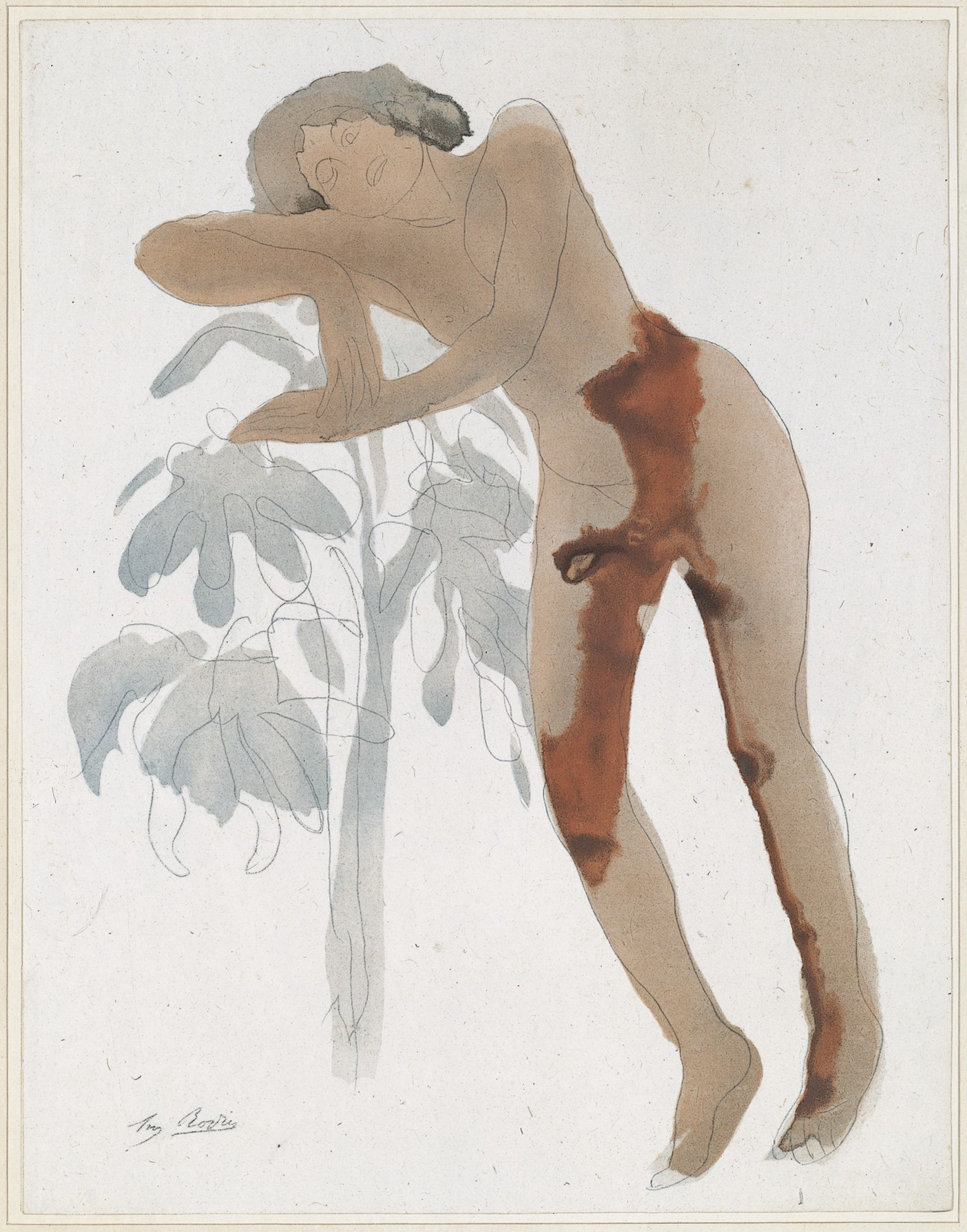 Book; Books